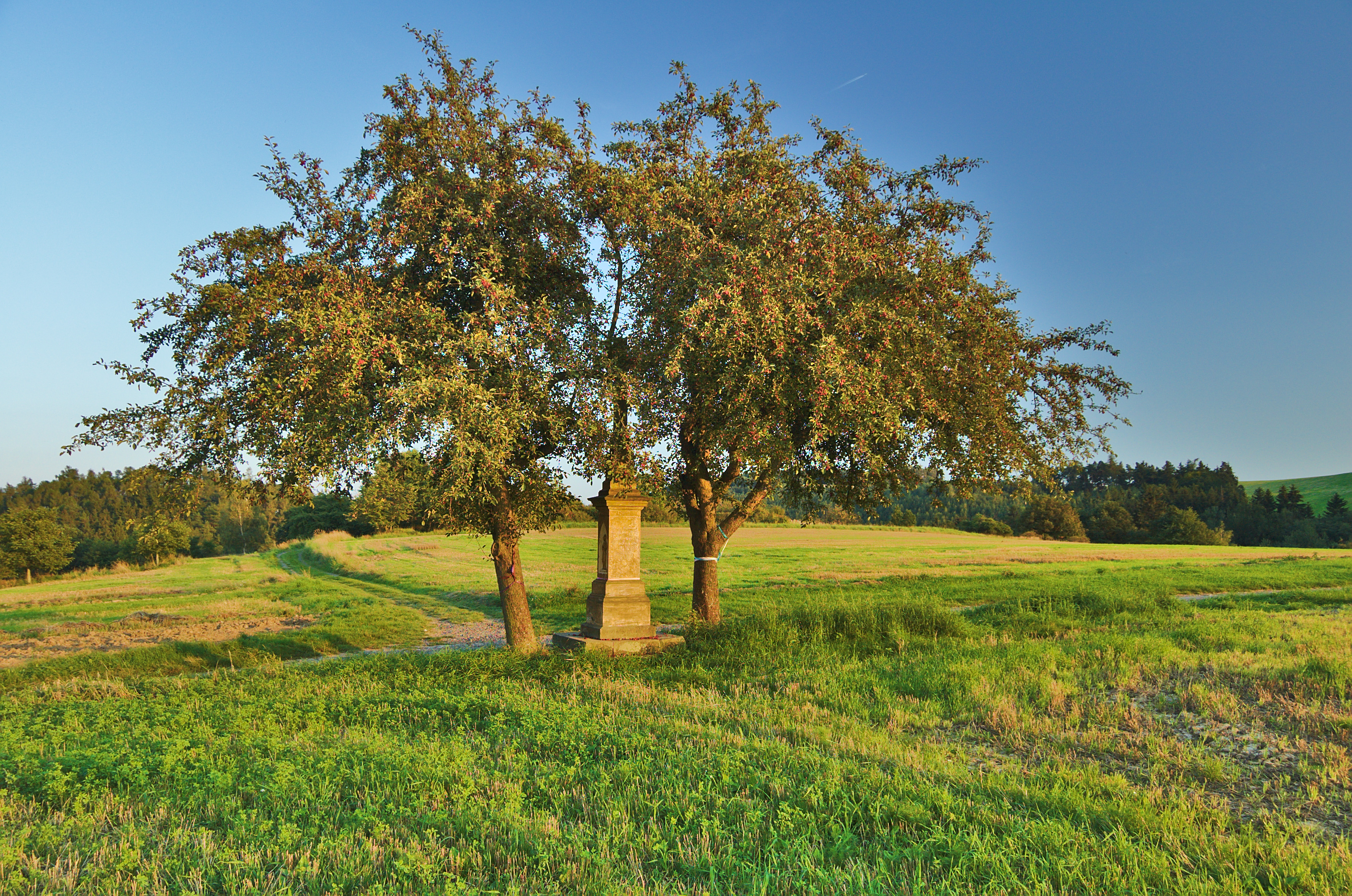 Kříž za obcí u polní cesty do Přemyslovic, Dvorek, Laškov, okres Prostějov